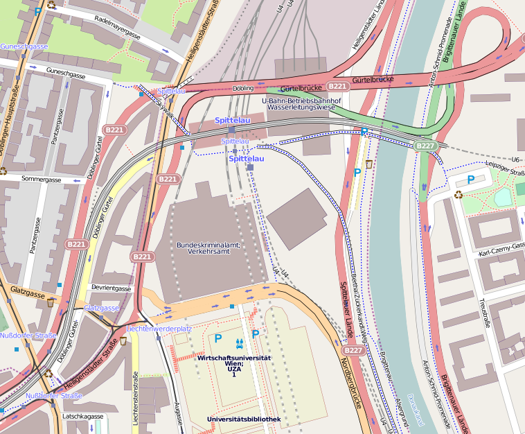 Das nördliche Ende des Wiener Gürtels, 1:6000